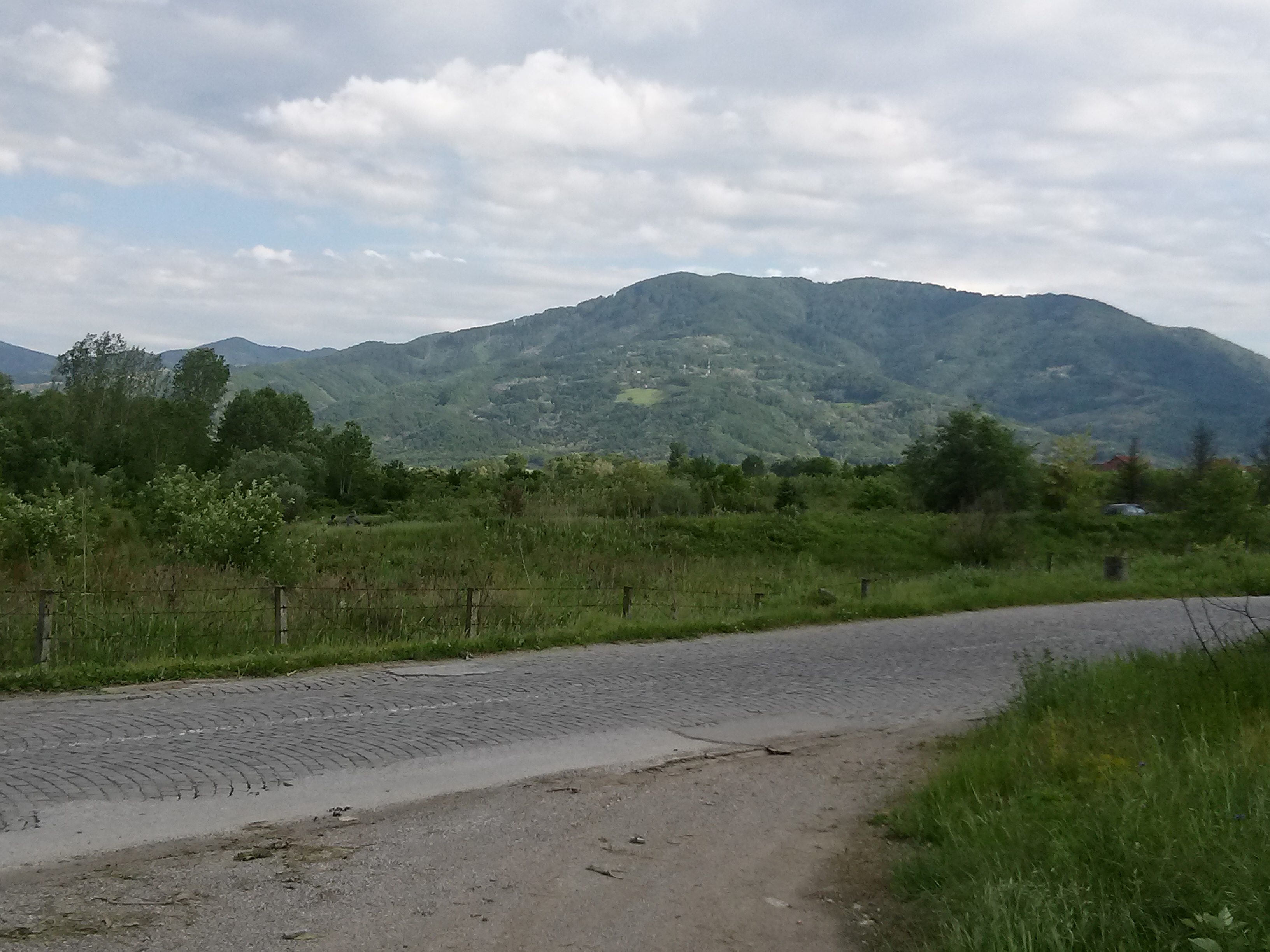 Srpski (latinica): Planina Kukavica